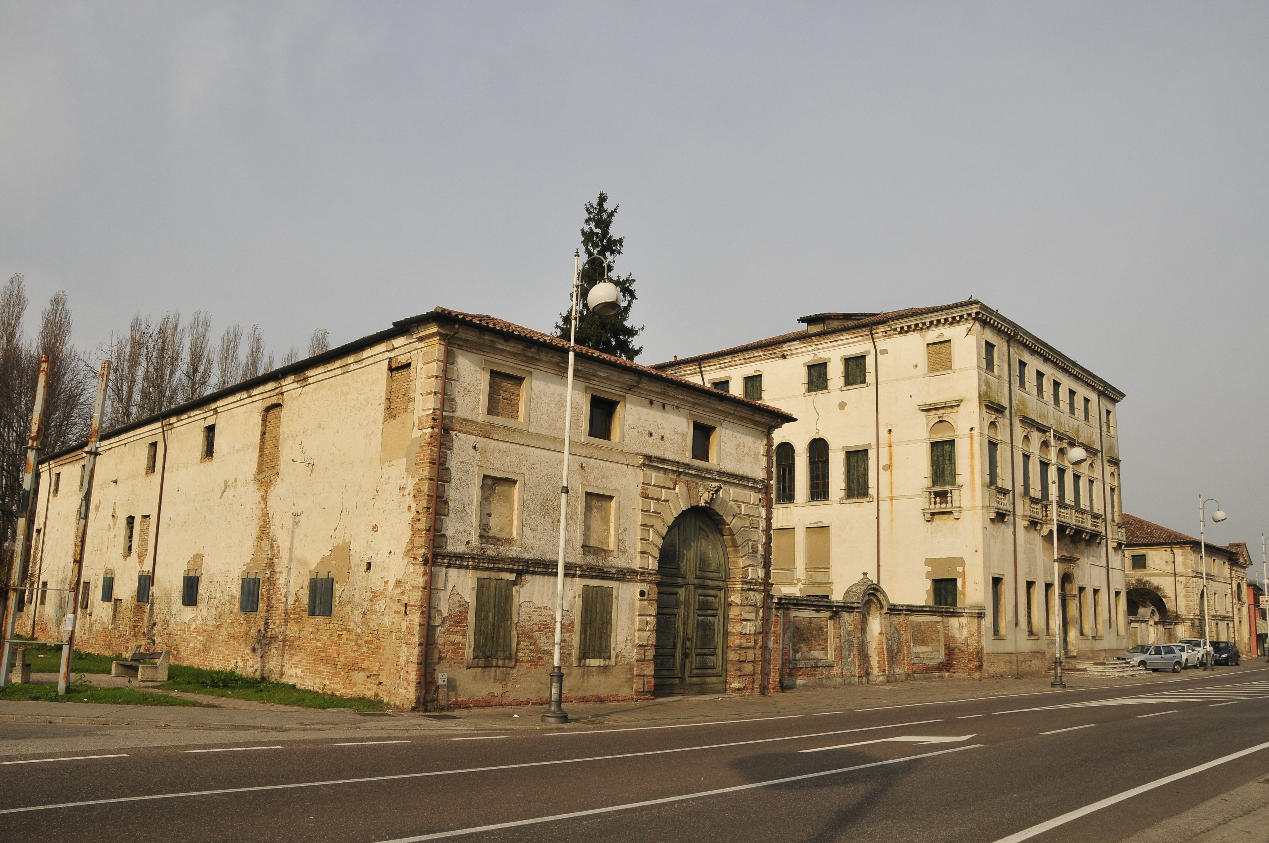 Palazzo Priuli Ballan vista fronte strada